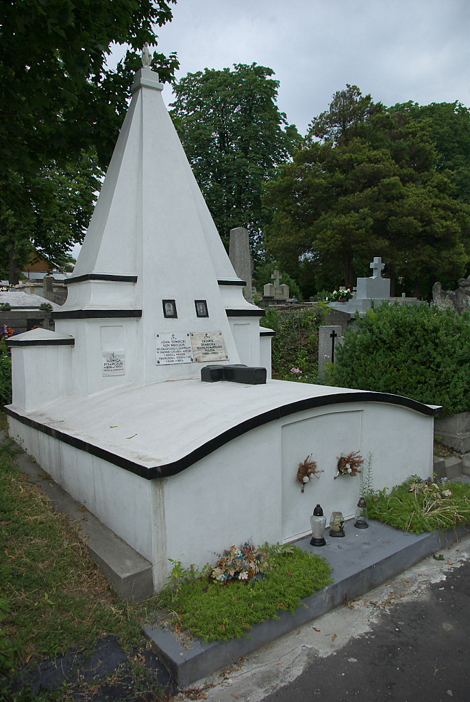 Wrocień tomb in Sanok